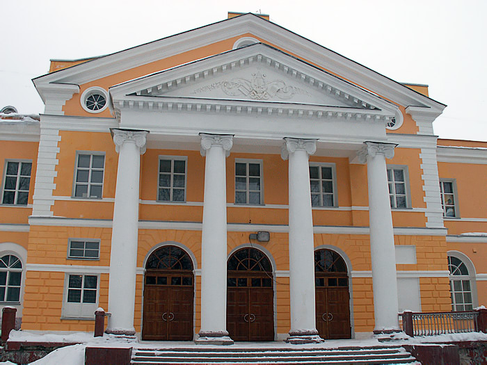 Коноваловский дворец (Народный дом, рабочий клуб фабрики им. Ногина, Городской культурный центр, Дворец культуры), 1915-1925, арх. П. Малиновский, В. Веснин, Н. Лазарев